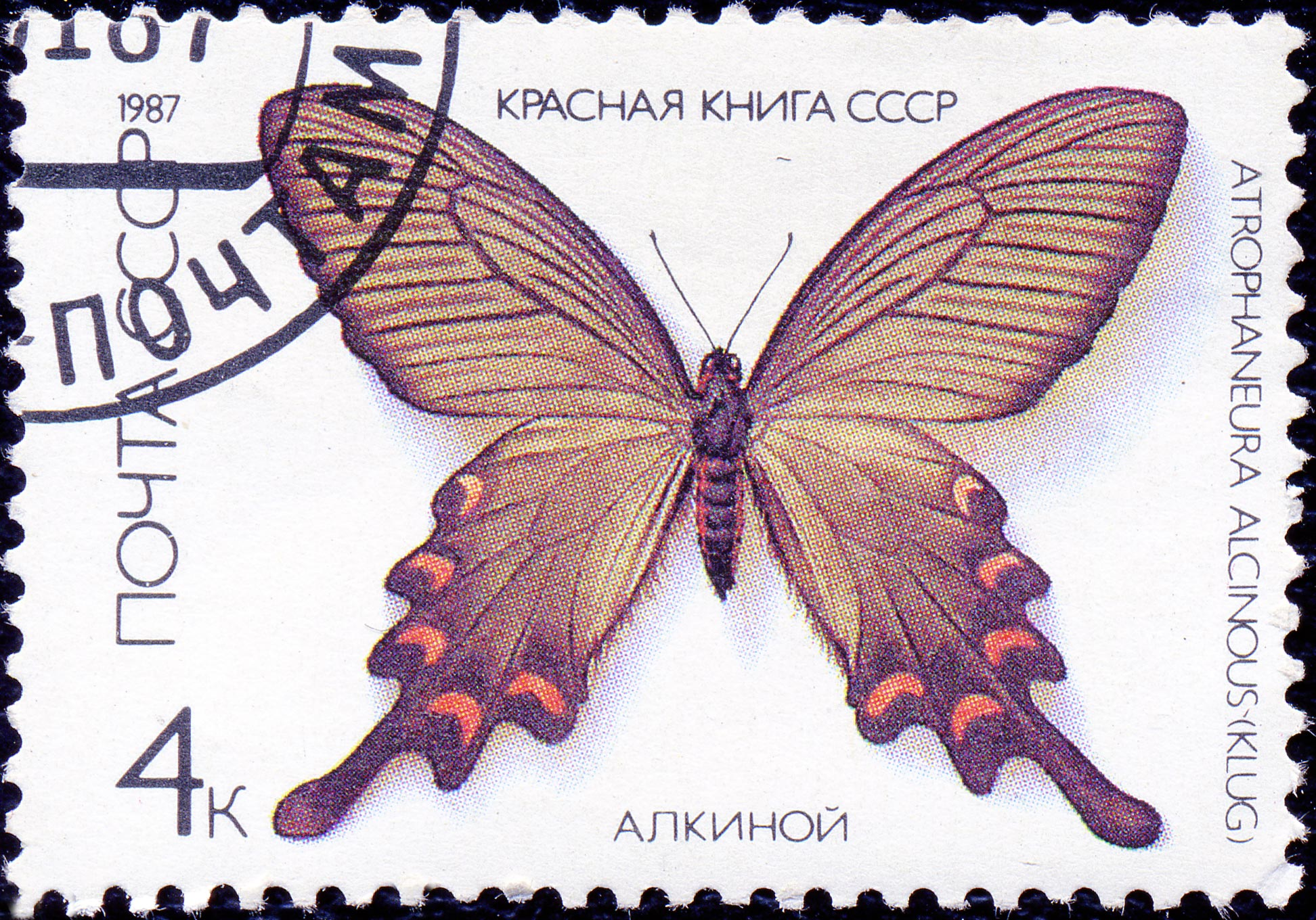 Почтовая марка СССР. 1987. Красная книга СССР. Алкиной